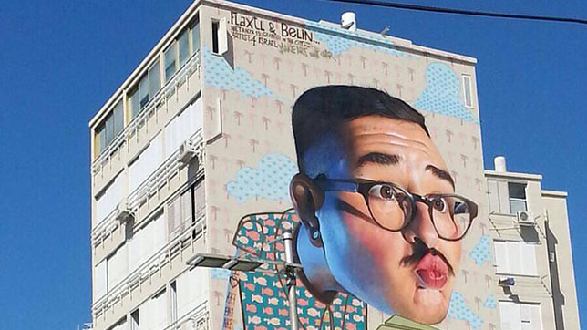 Mural Netanya Israel, Belin